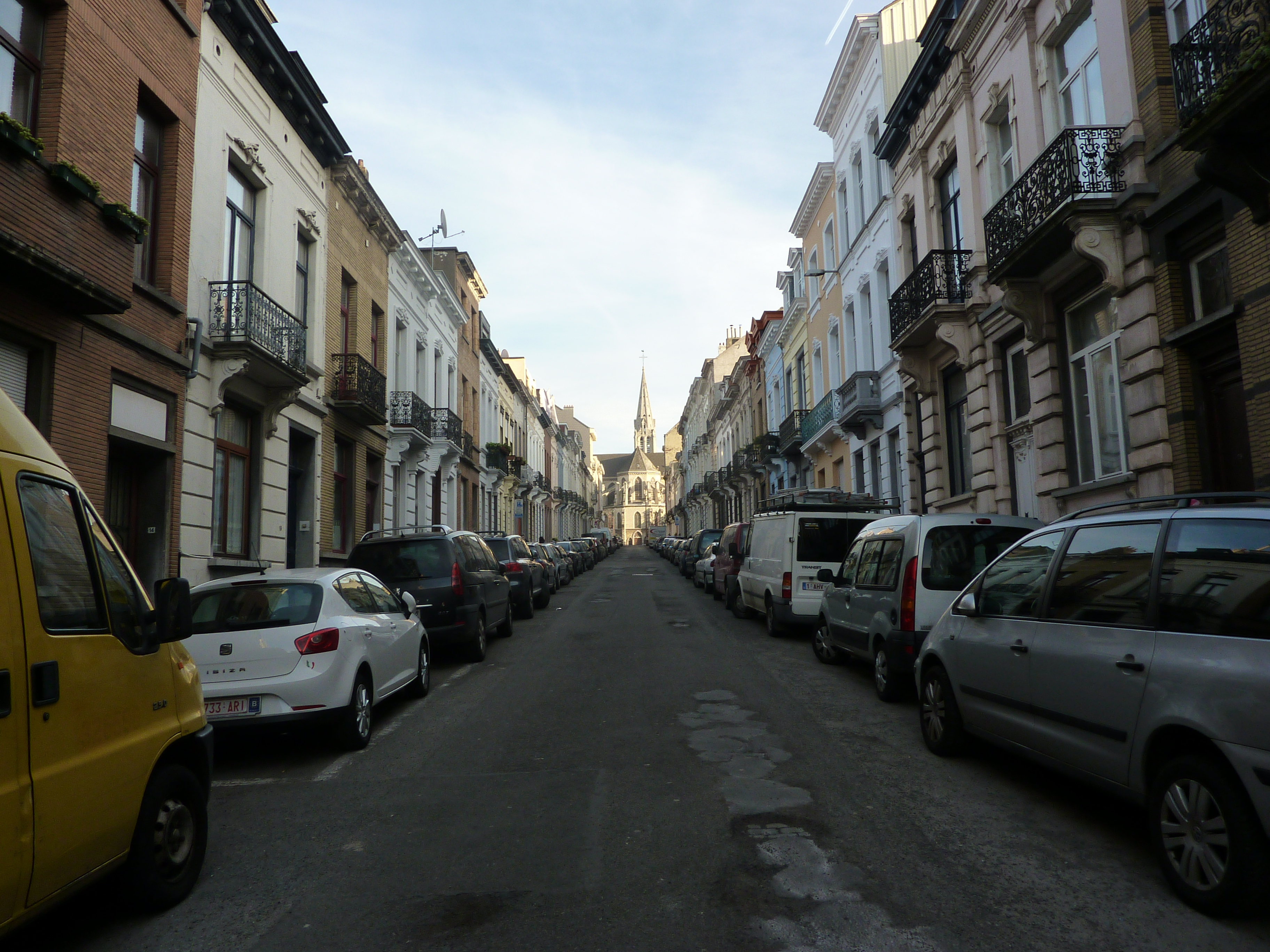 Rue Vandermeersch à Schaerbeek, Bruxelles, Belgique.